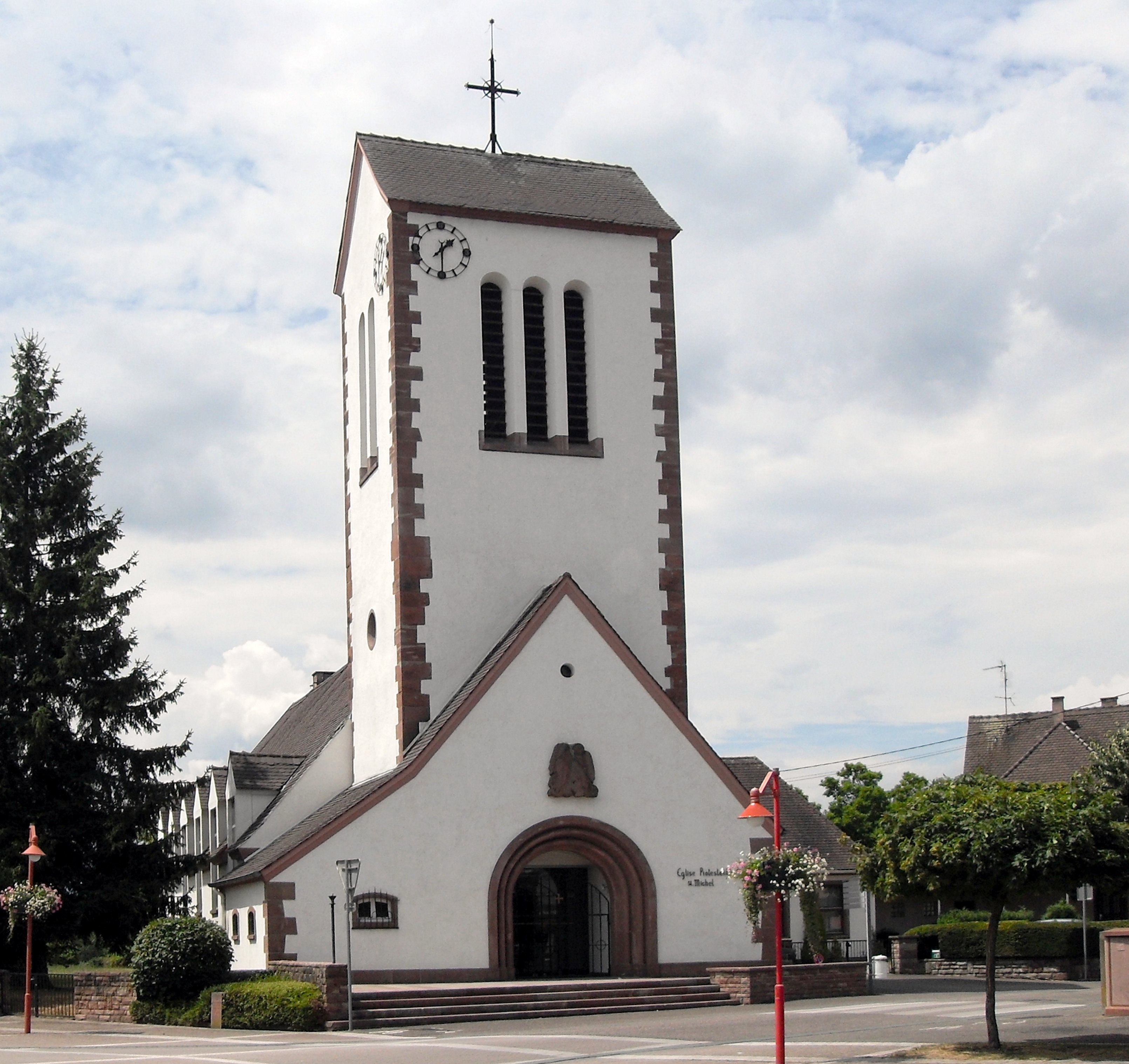 L'église Protestante_Saint-Michel d'Oberhoffen-sur-Moder